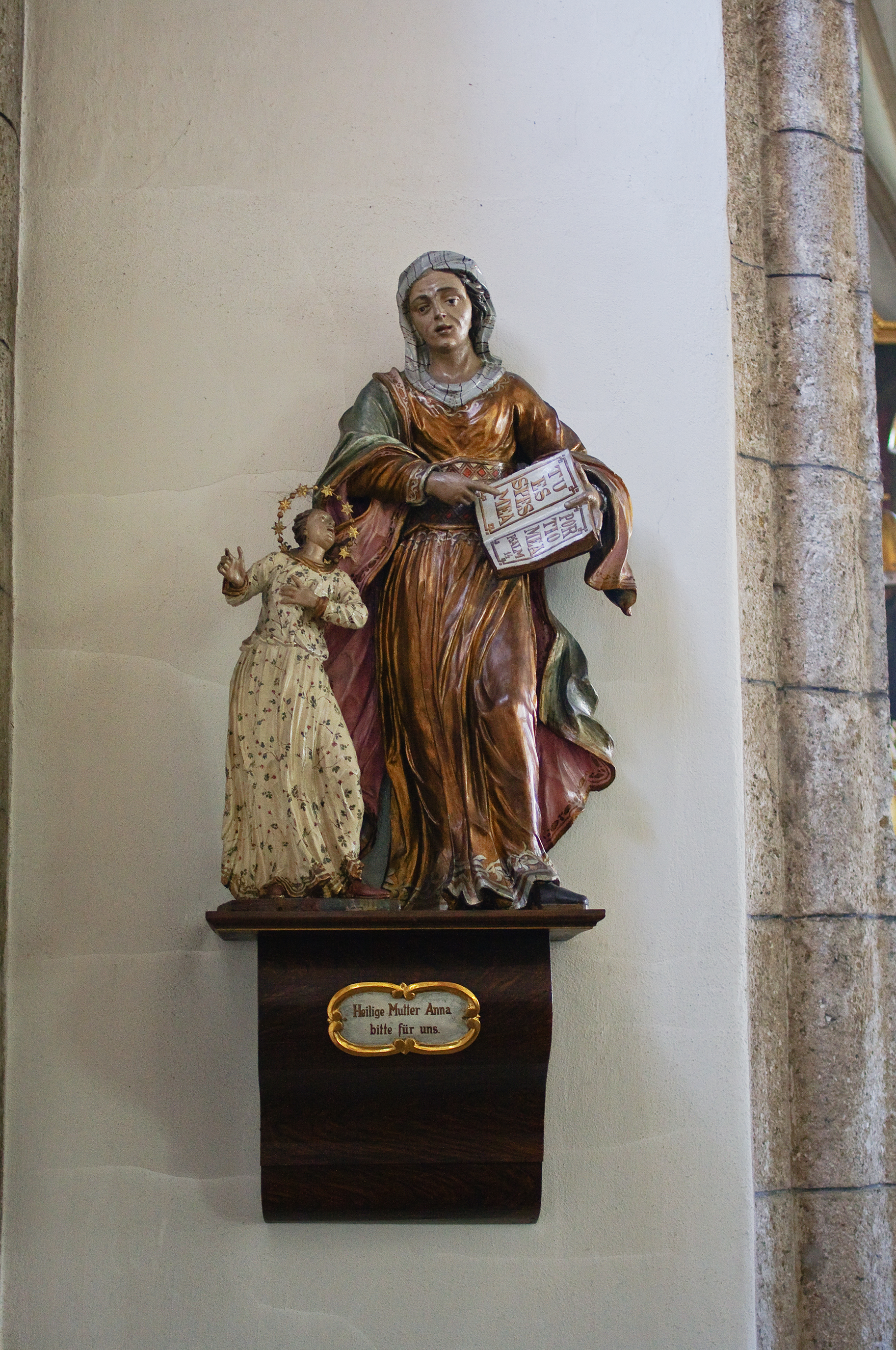 Barocke Figurengruppe der heiligen Anna mit ihrer Tochter Maria im Langhaus der Mollner Pfarrkirche (1. Drittel 18. Jahrhundert), Farbfassung von um 1900 - Beschriftung auf dem Buch: "Tu es spes mea, portio mea", Psalm 142,6 (Vulgata: 141,6)